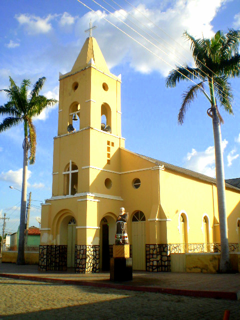 Igreja São Pedro, no Bairro Pereiros, na Cidade de Pombal Paraíba, Brasil. Na Estátua, Frei Damião